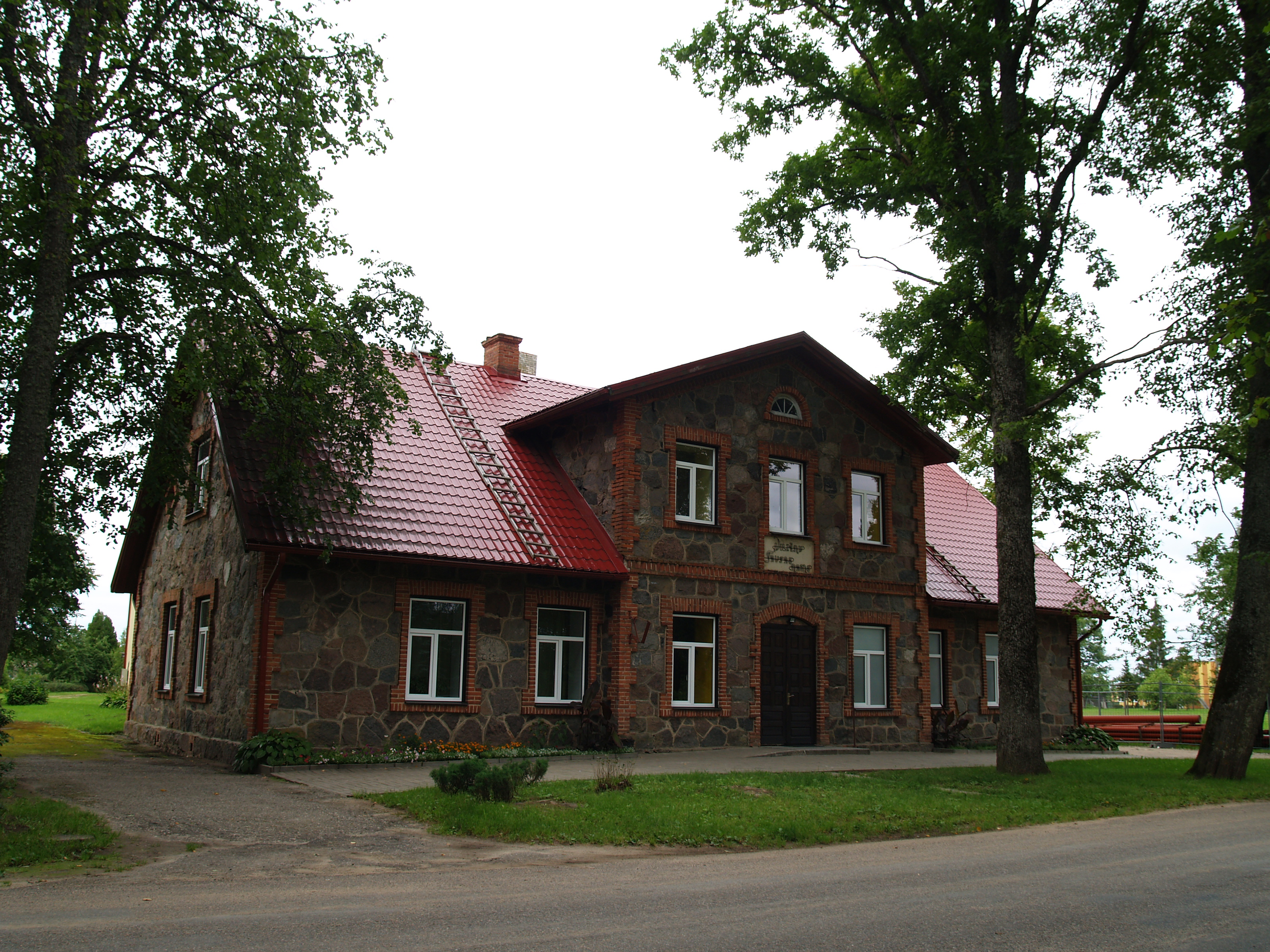 Vilzēni rahvamaja